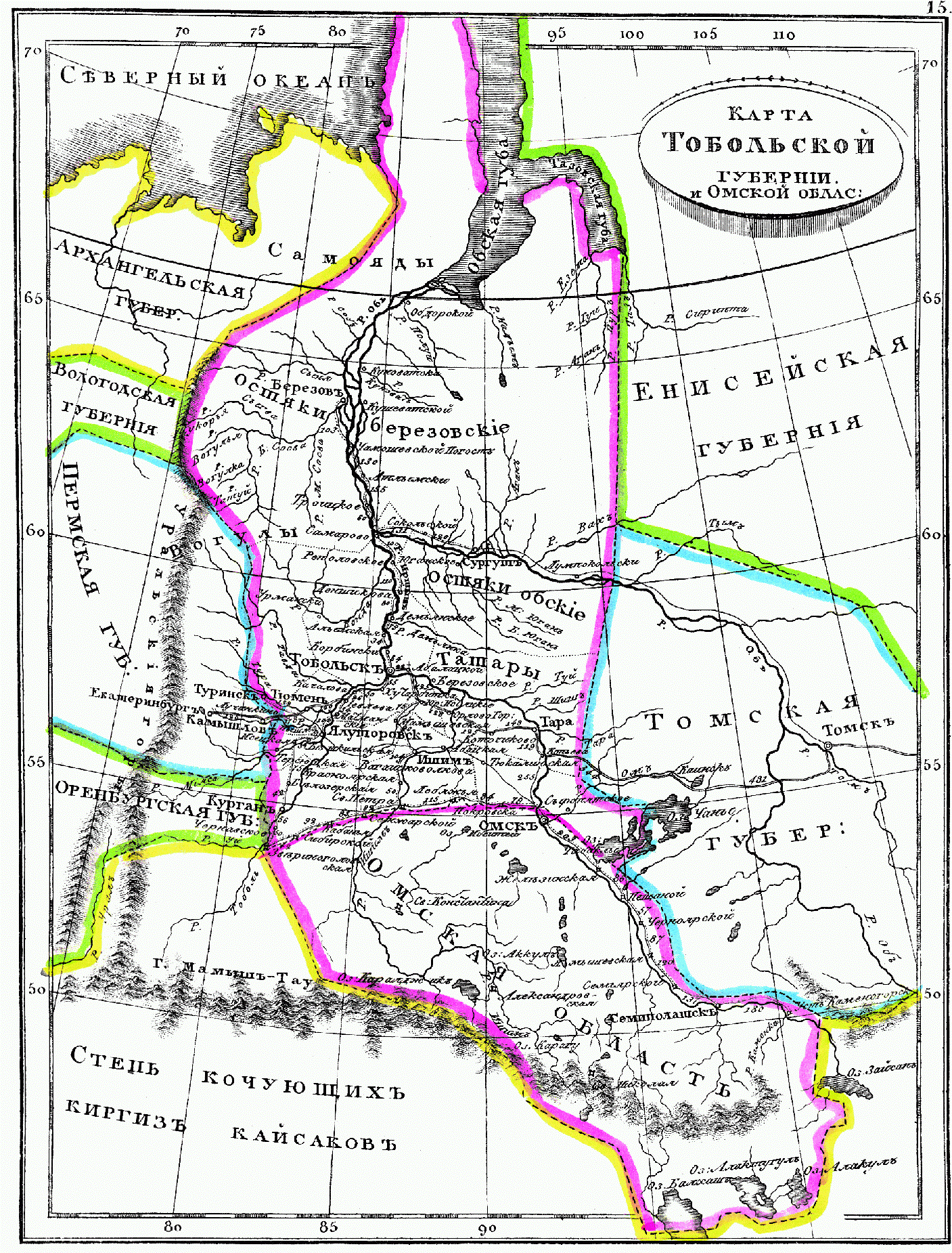 Карта Тобольской губернии, 1835